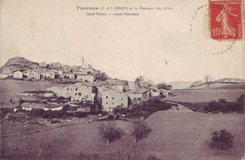 Village de Turriers (Alpes-de-Haute-Provence)